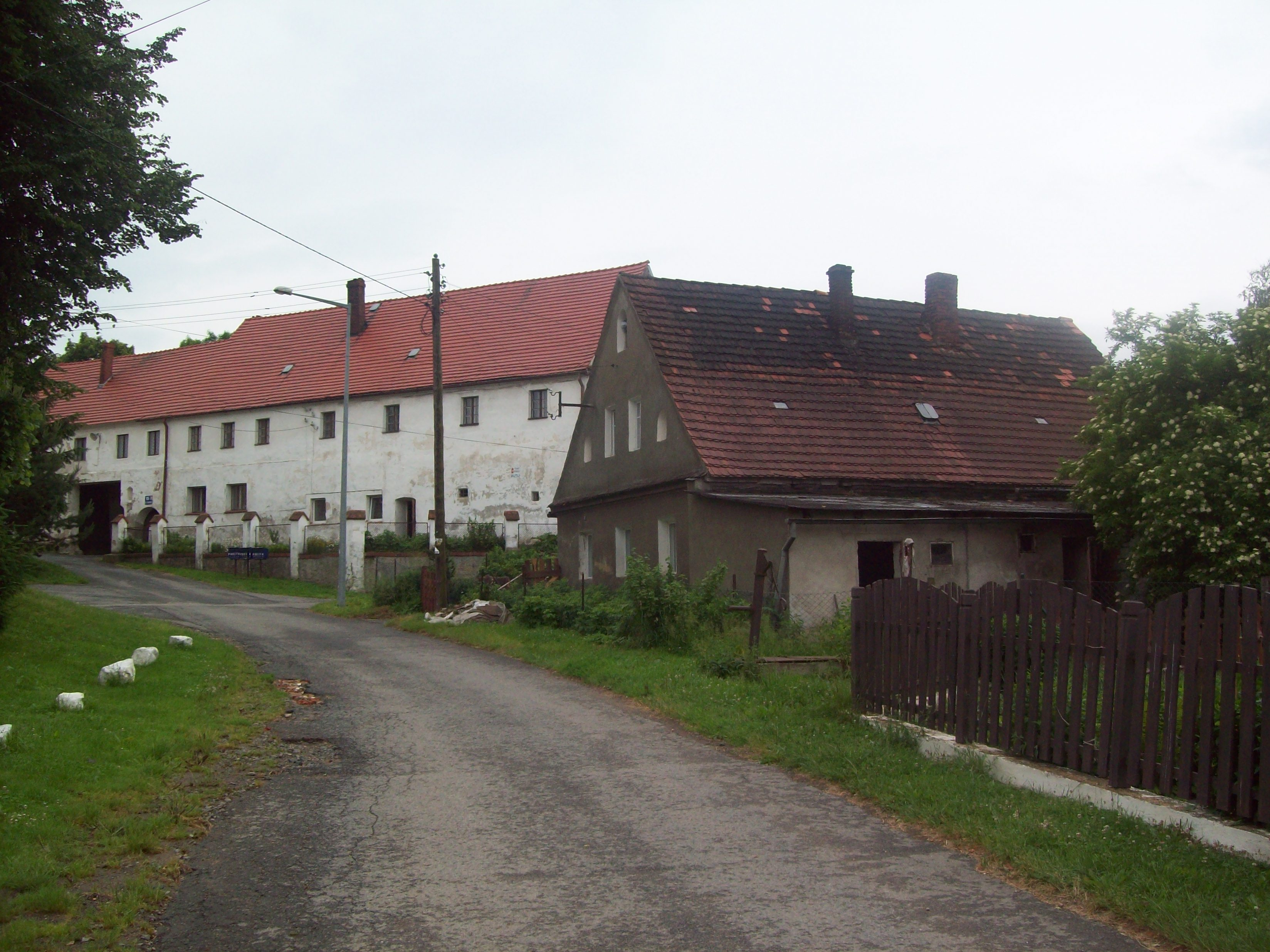 Zabudowa Zagórza w Kłodzku